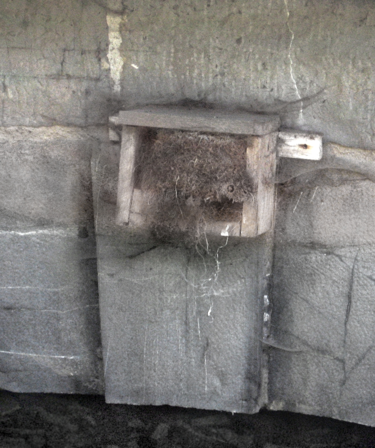 Ein 1985 an einer Brücke über die Settmecke im Stadtgebiet Sundern, NRW, angebrachter Nistkasten für Wasseramsel. Wegen jährlicher Säuberung auch 2006 noch von der Wasseramsel genutzt.